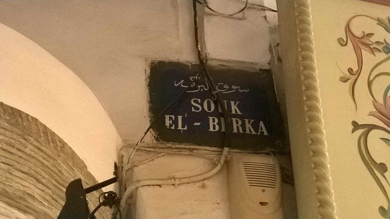 La médina de Tunis مدينة تونس العتيقة